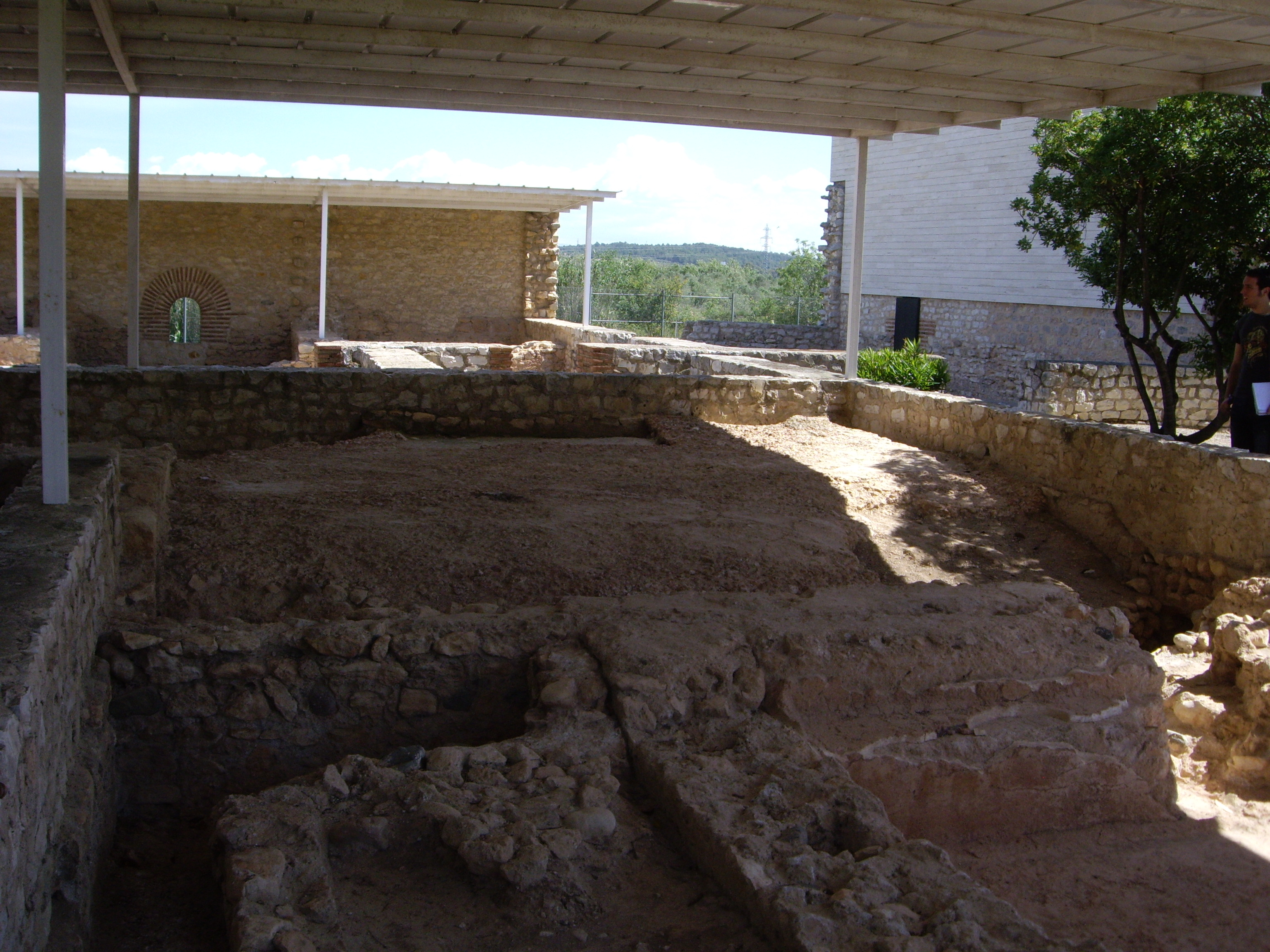 Restes arqueològiques de la vila roma de Centcelles.